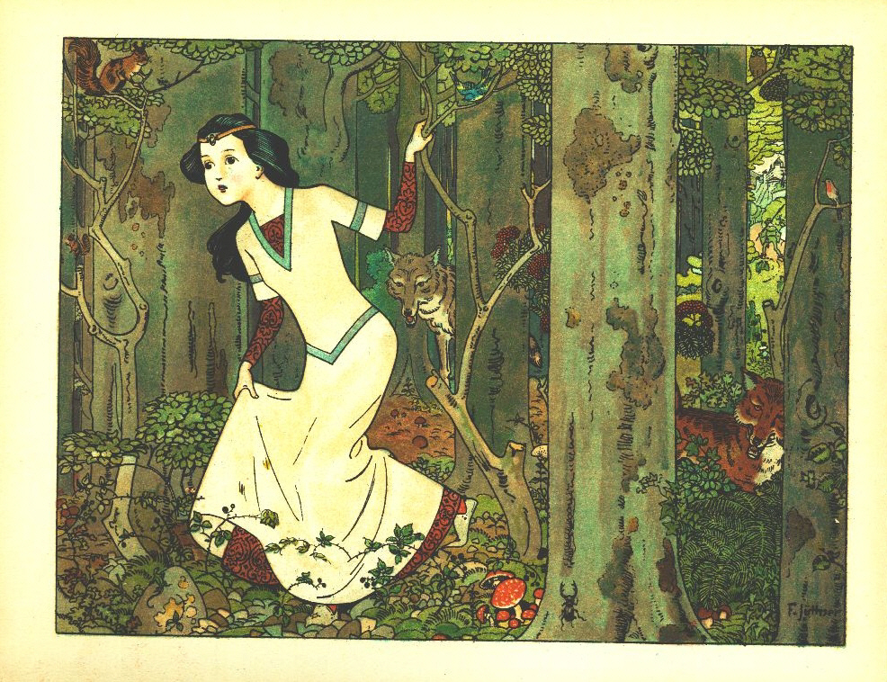 Franz Jüttner (1865–1925): Illustration from Schneewittchen, Scholz' Künstler-Bilderbücher, Mainz 1910